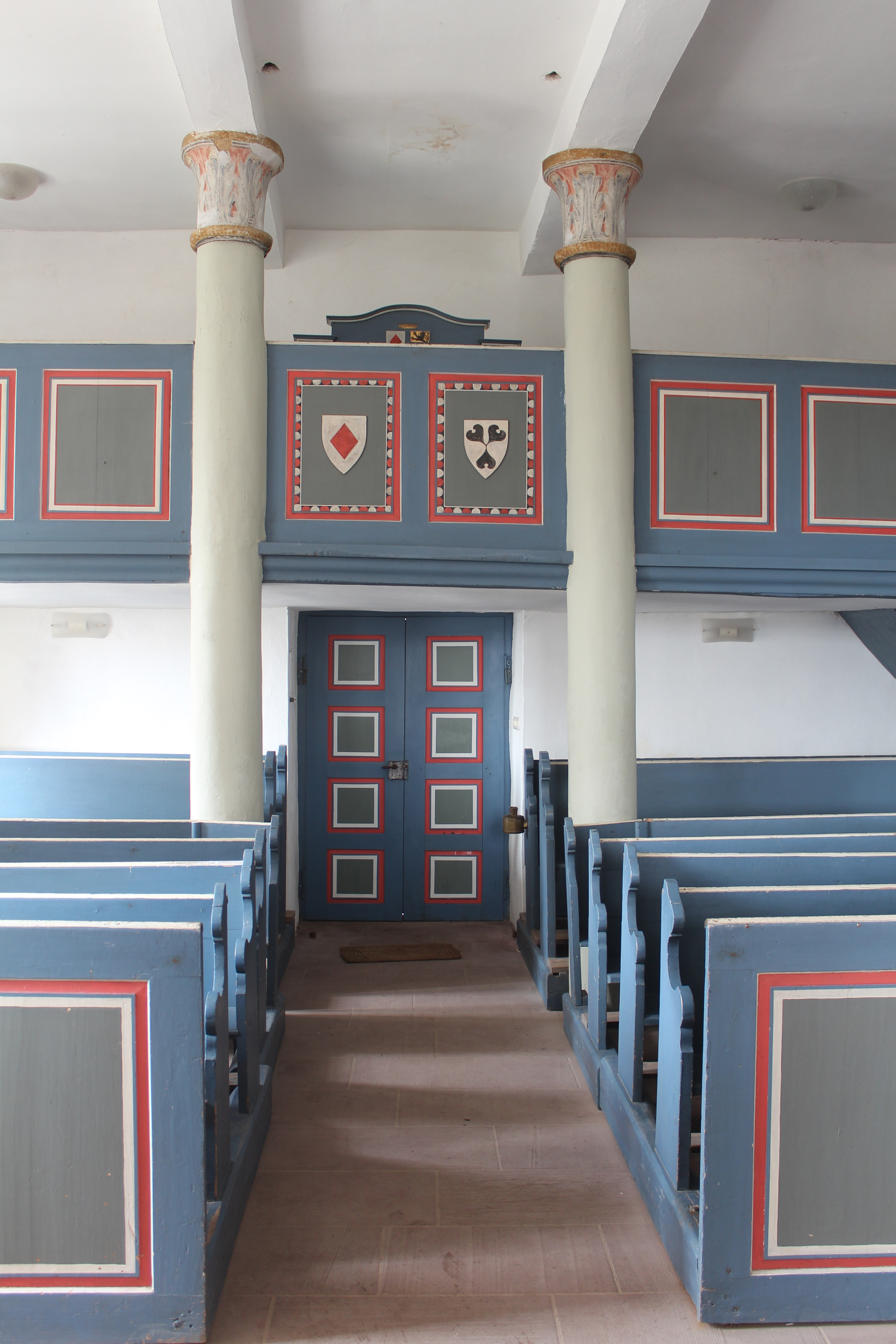 Blick vom Altar der Burgkapelle Nordeck zum Haupteingang